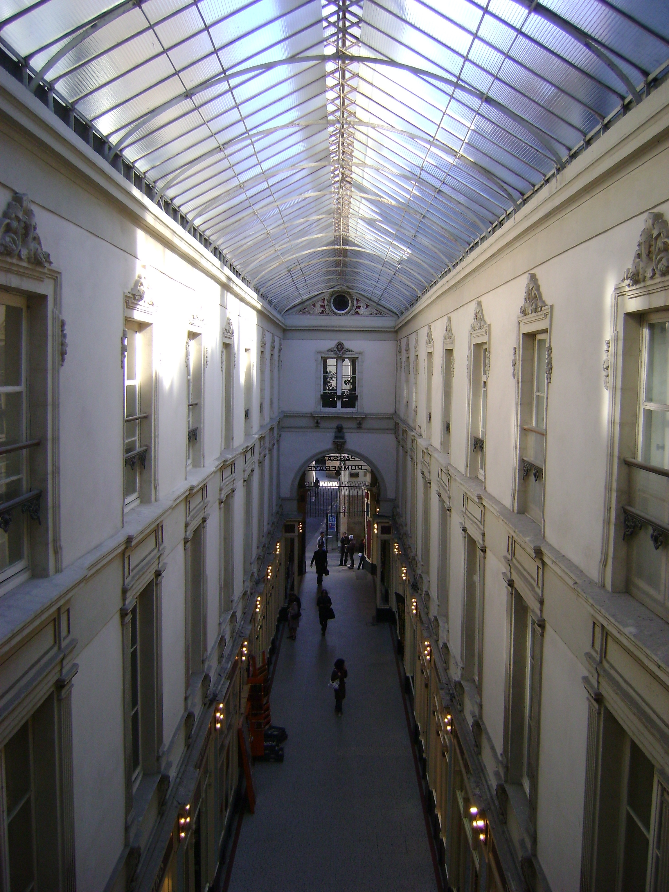 Le passage Pommeraye de Nantes. La galerie sud. .